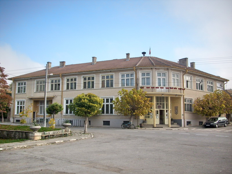 Село Зараево, община Попово. Кметството и пощата.